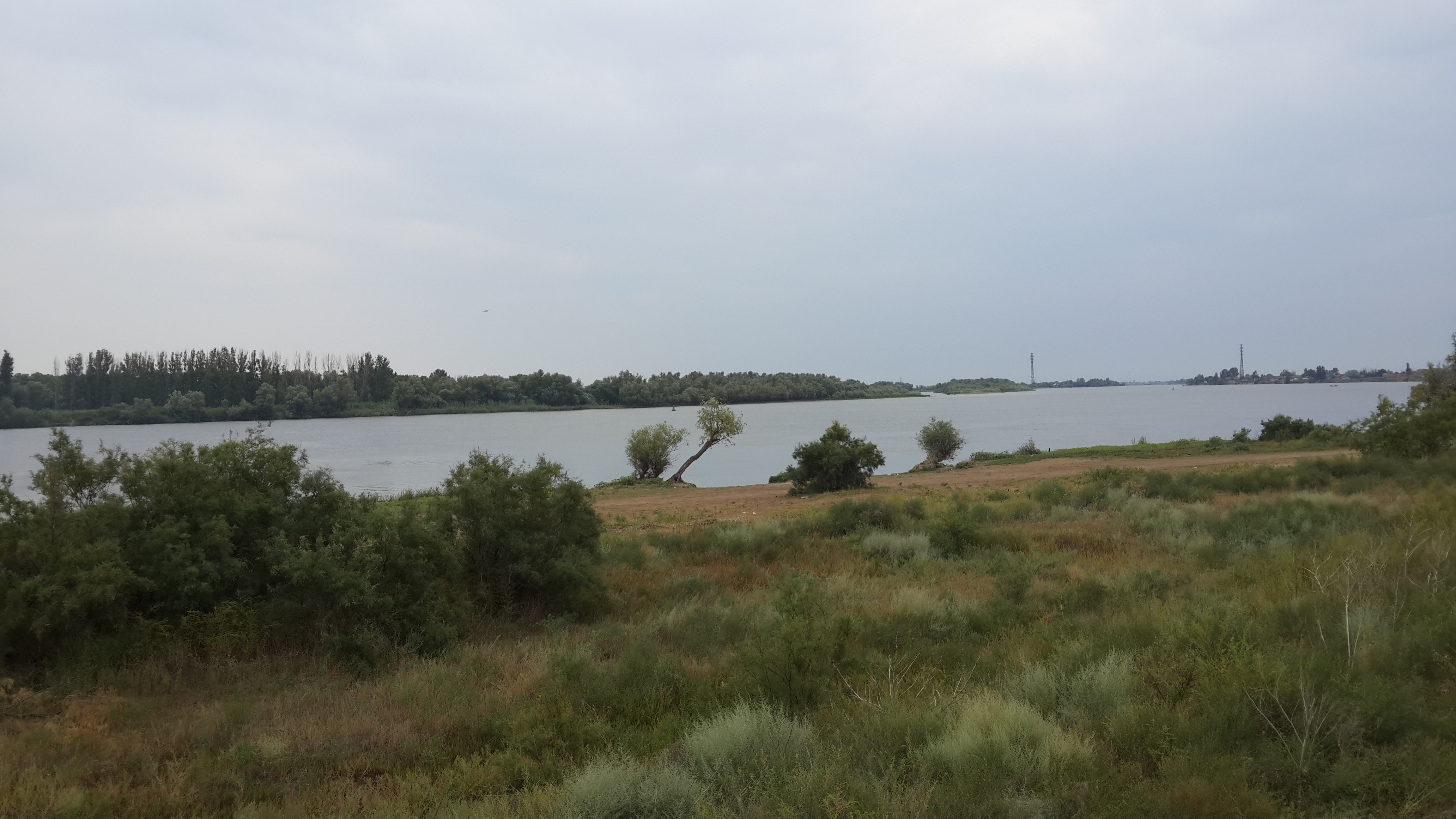 Ikryanoye, Astrakhanskaya oblast', Russia